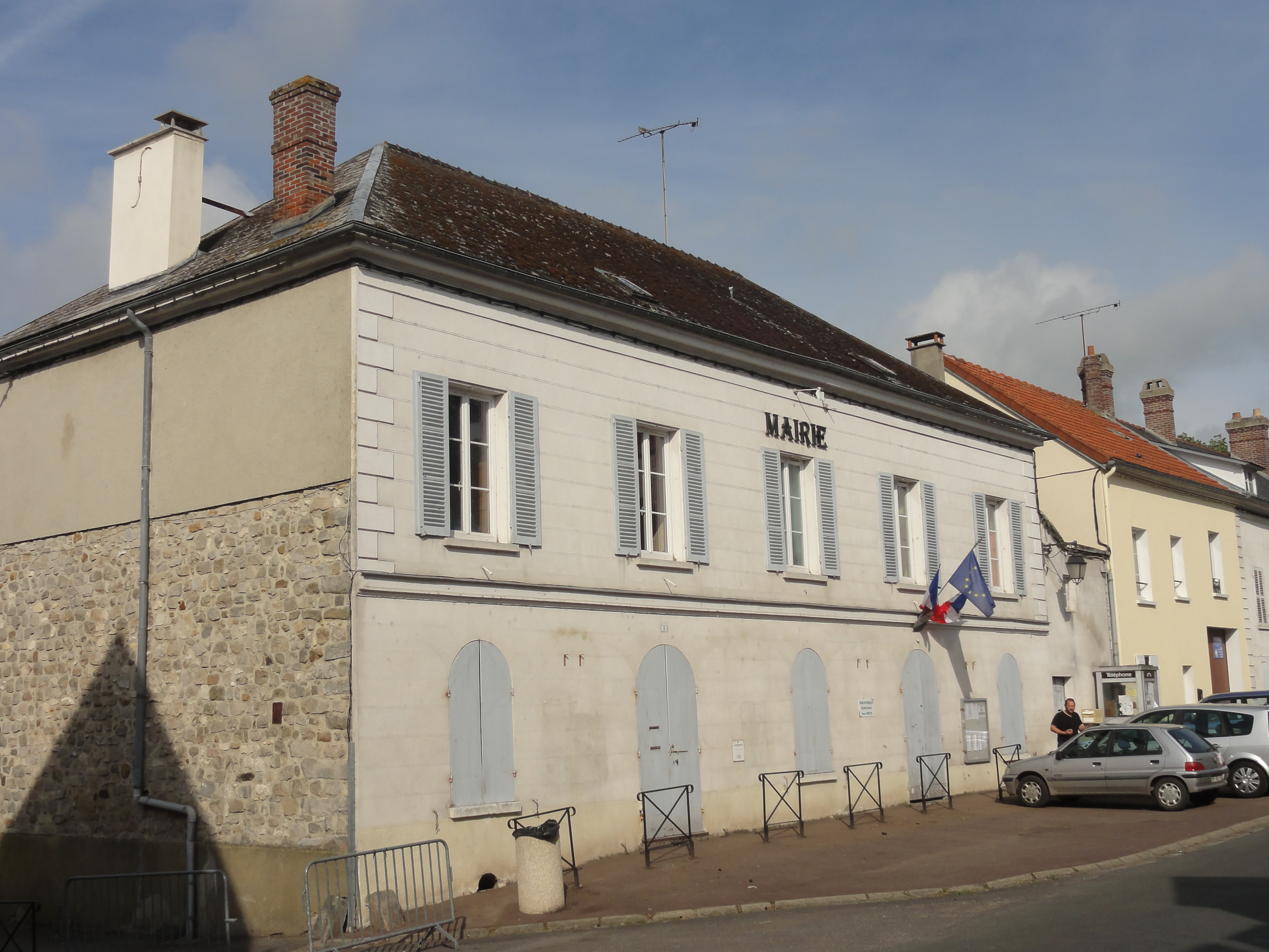 La mairie, rue de la Libération.